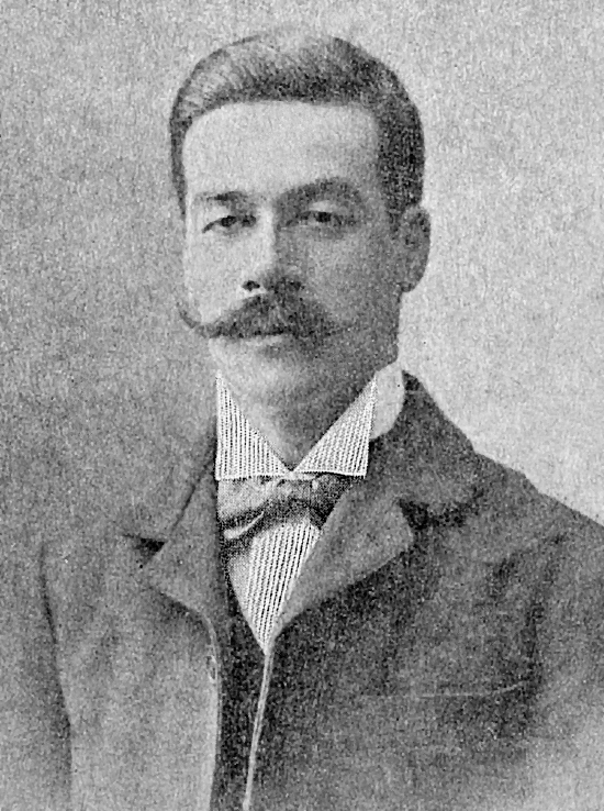 Mi juramento : en la Cámara de Diputados, en la sesión del 5 de junio de 1906 / Luis E. Recabárren S.